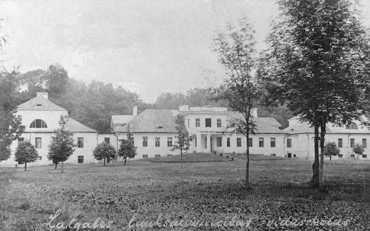 Malnavas muiža 1922.gads